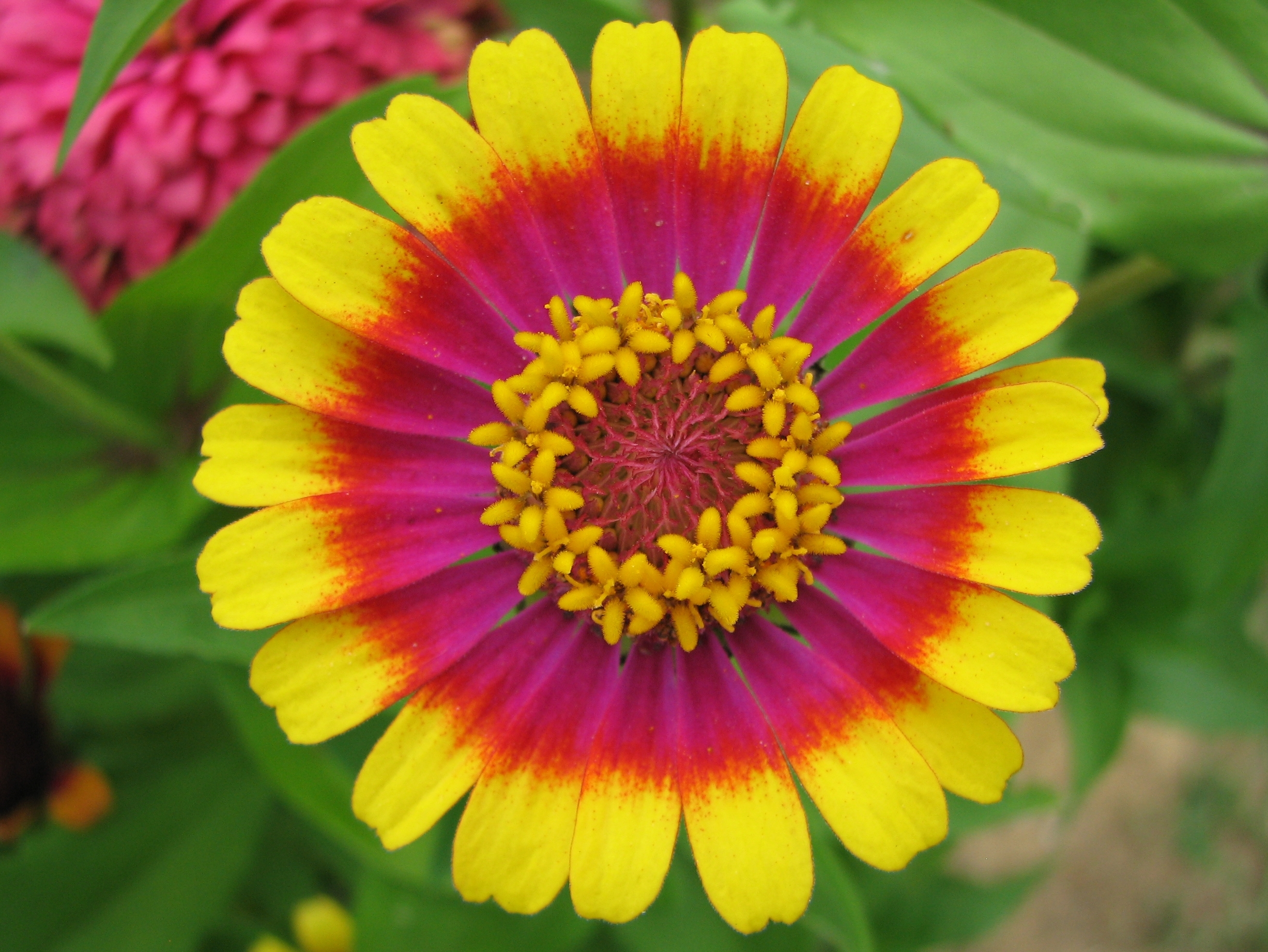 Zinnia